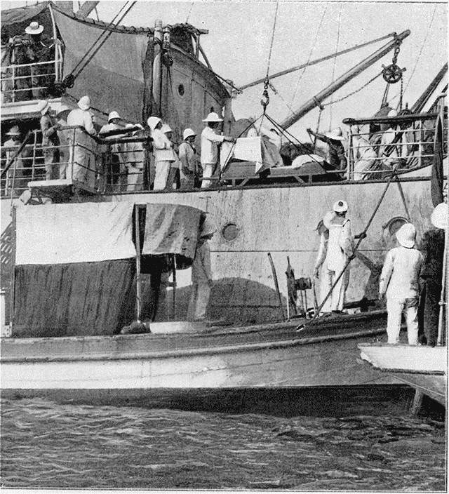 "Le retour: en vue de Dakar.--La civière de M. de Brazza accrochée au palan qui va descendre l'explorateur, du paquebot à bord du petit vapeur côtier."